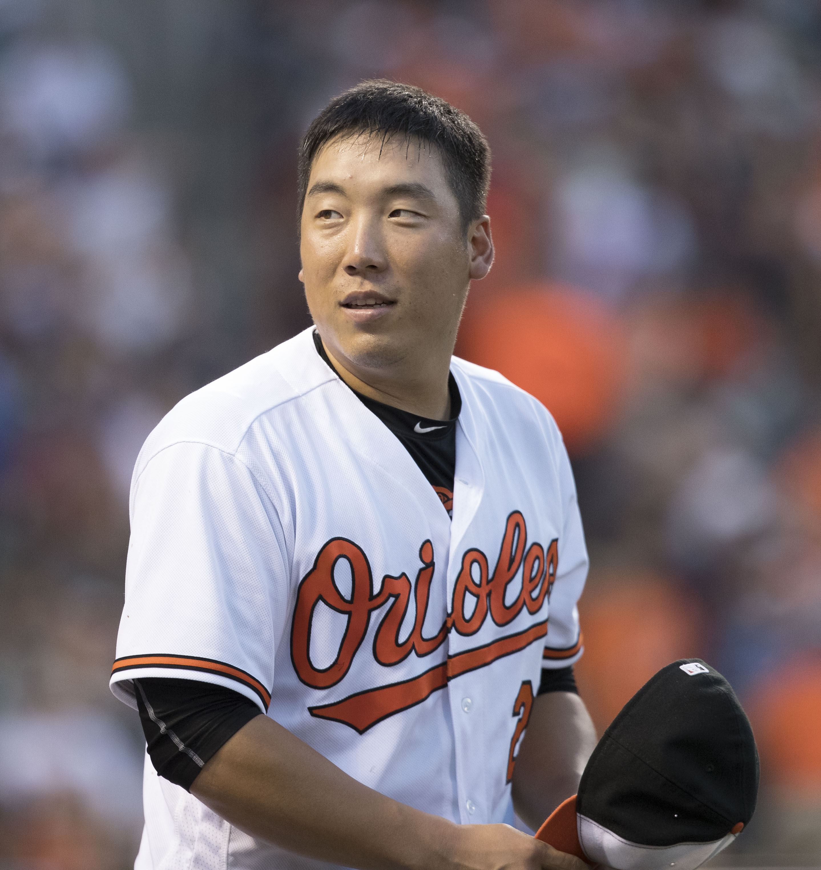 Astros at Orioles 8/18/16